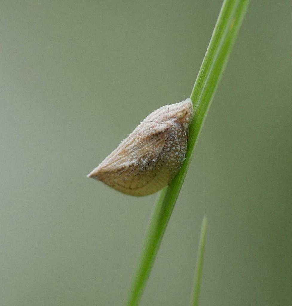 Mimophantia maritima：トビイロハゴロモ 2018/08/11 和歌山県田辺市：Tanabe City. Wakayama Pref. Japan